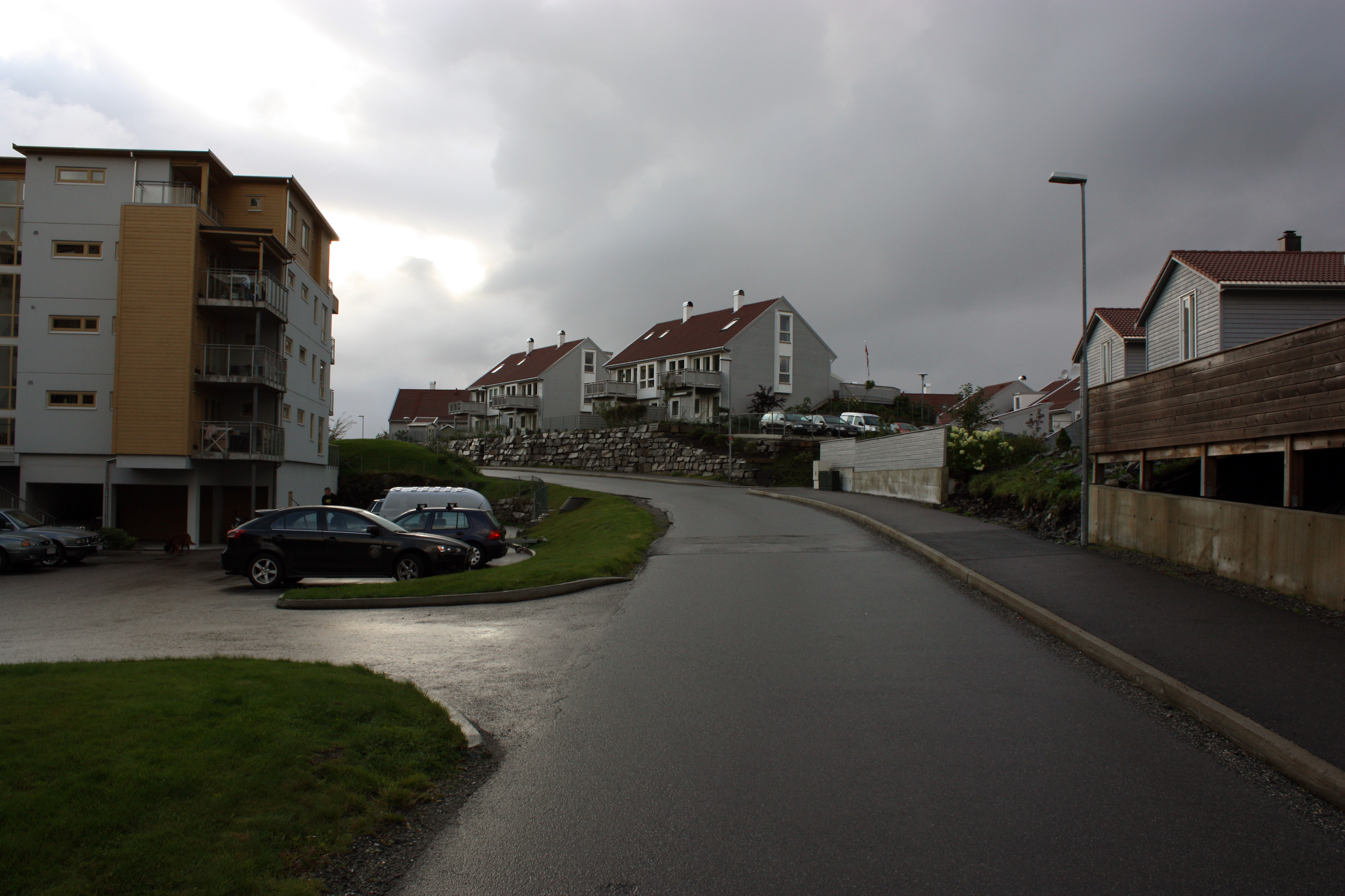 Apeltunlien, Fana, Bergen.